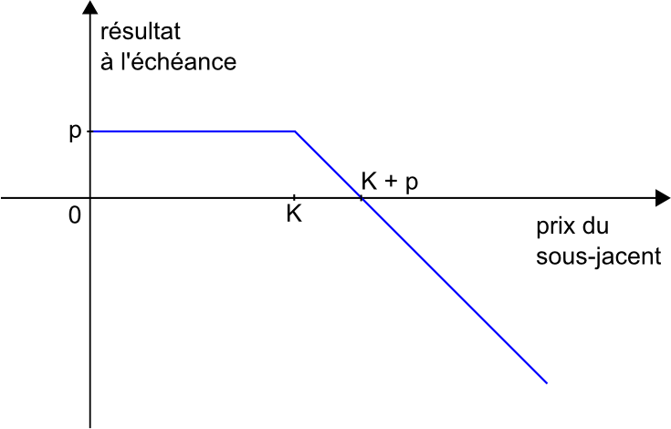 Profil de résultat d'un vendeur de call - Pay off of a short call